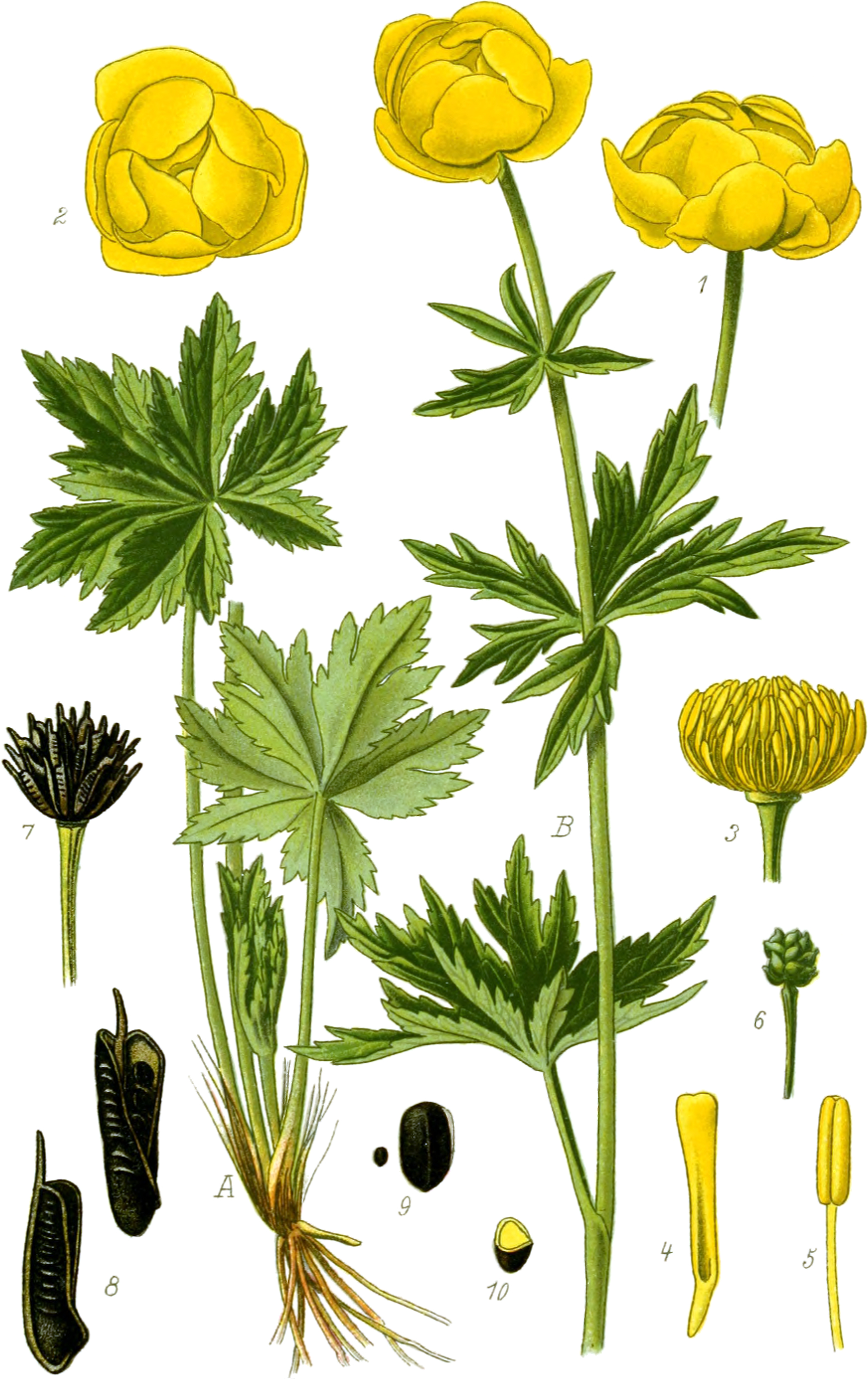 Tafel 252. Trollius europaeus L. Trollblume: AB blühende Pflanze; 1 und 2 Blüten; 3 Blüte nach Entfernung der äusseren Blütenhülle; 4 Blatt der inneren Blütenhülle; 5 Staubblatt; 6 kleines, halbreifes Fruchtköpfchen; 7 reifes Fruchtköpfchen; 8 einzelne Balgkapseln; 9 Same; 10 desgl. im Querschnitte. 4, 5, 8 bis 10 vergrössert.